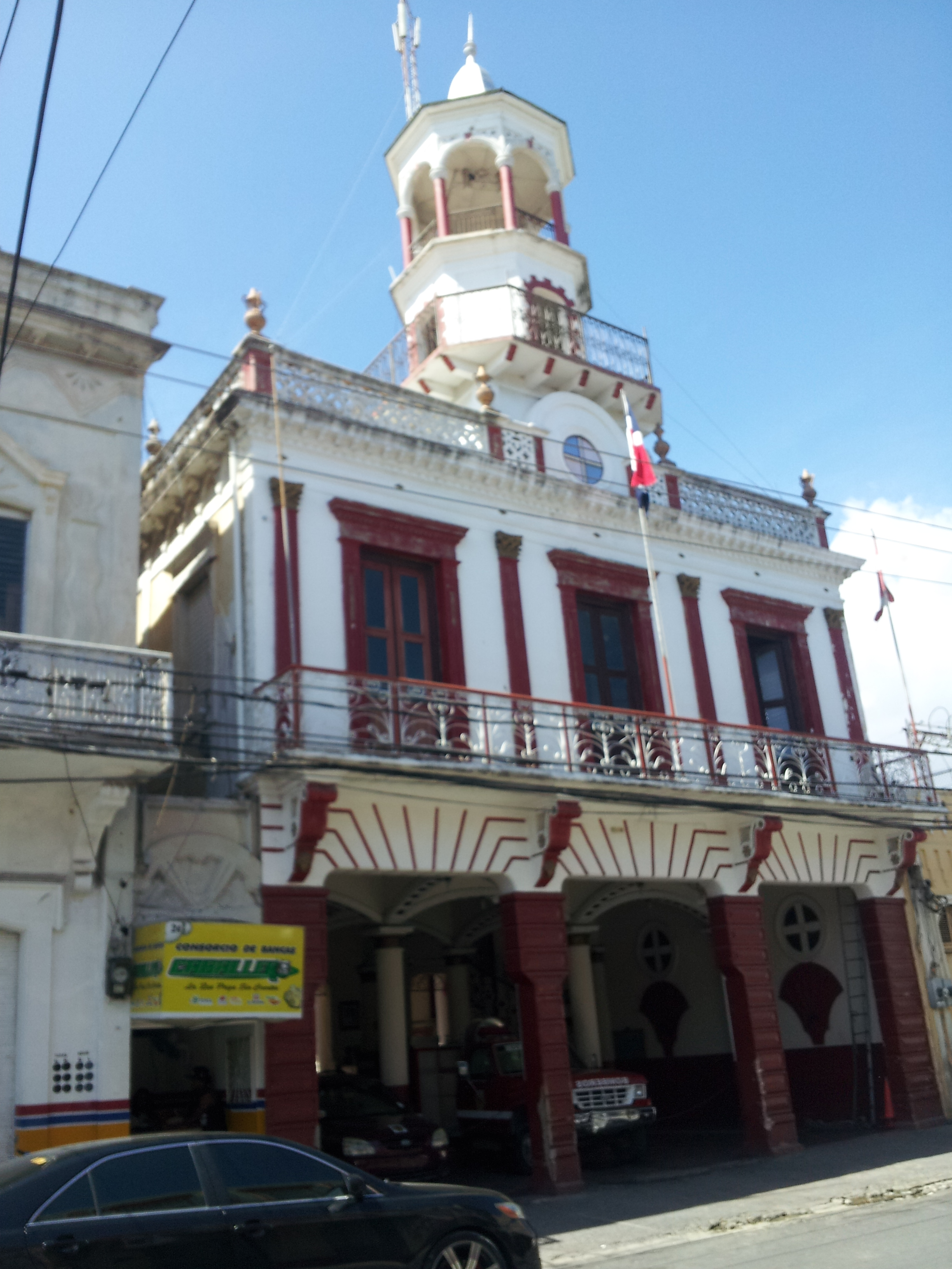 Primer destacamento de bomberos de la República Dominicana